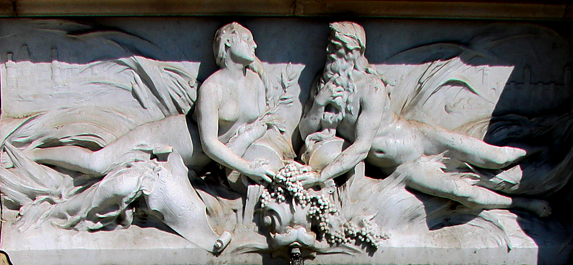 Bas-relief représentant le Lot et la Garonne sur la fontaine Clément Marot à Cahors.